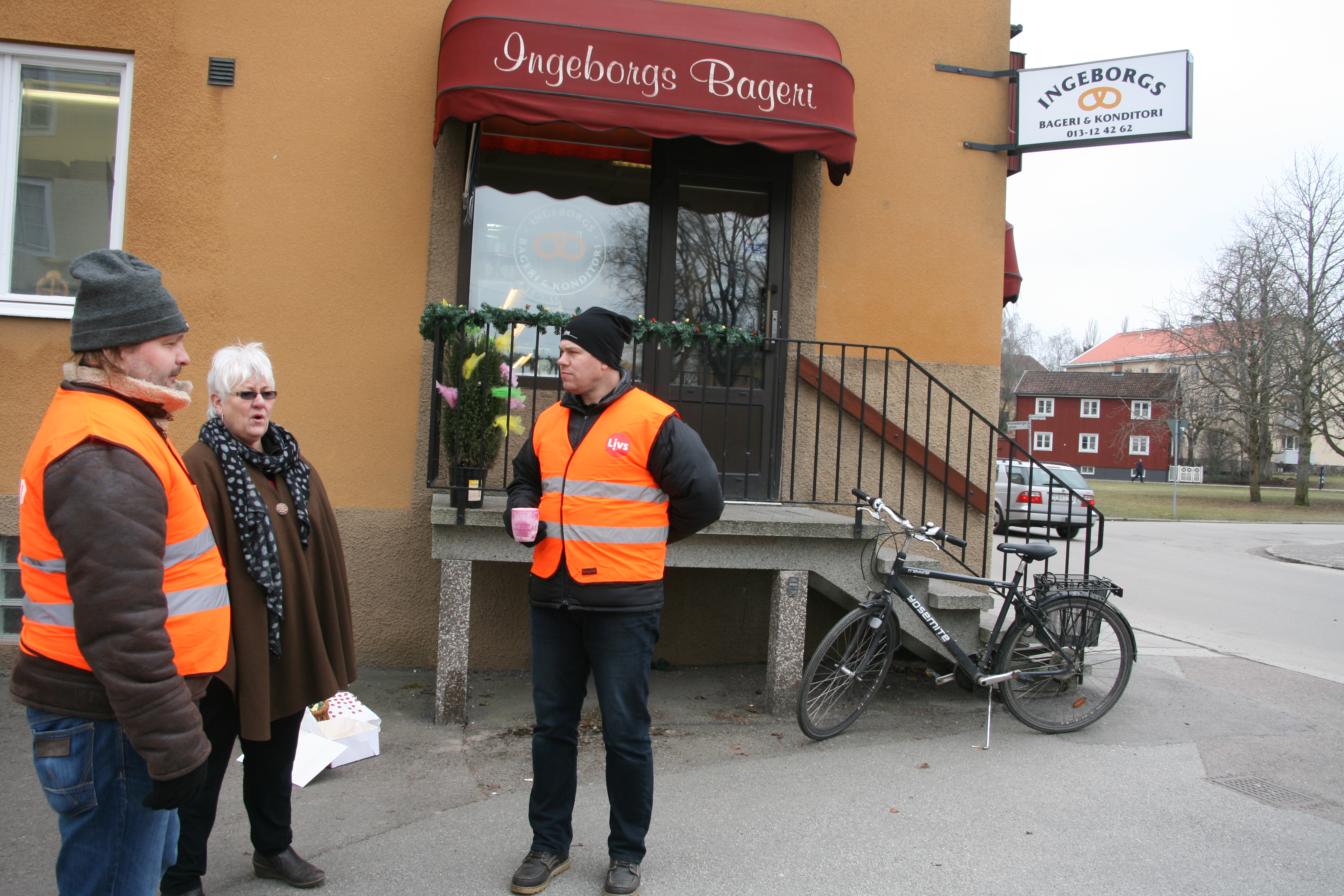 Facklig blockad av Ingeborgs bageri i Linköping mars 2015. Gunn Bredstedt bjuder på kaffe när Livsmedelsarbetareförbundet region öst (Robert Gustafsson till vänster, en anonym funktionär till höger) står på post utanför Ingeborgs bageri, Hunnebergsgatan 39, Linköping, som är satt i blockad på grund av ovilja att teckna kollektivavtal.